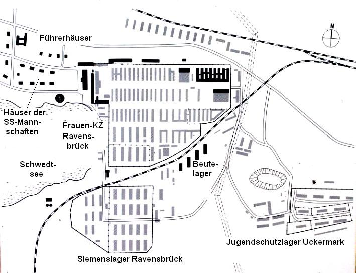 Gesamter Lageplan vom KZ-Ravensbrück mit Siemenslager, Jugendschutzlager und Wohnungen der SS-Mannschaften